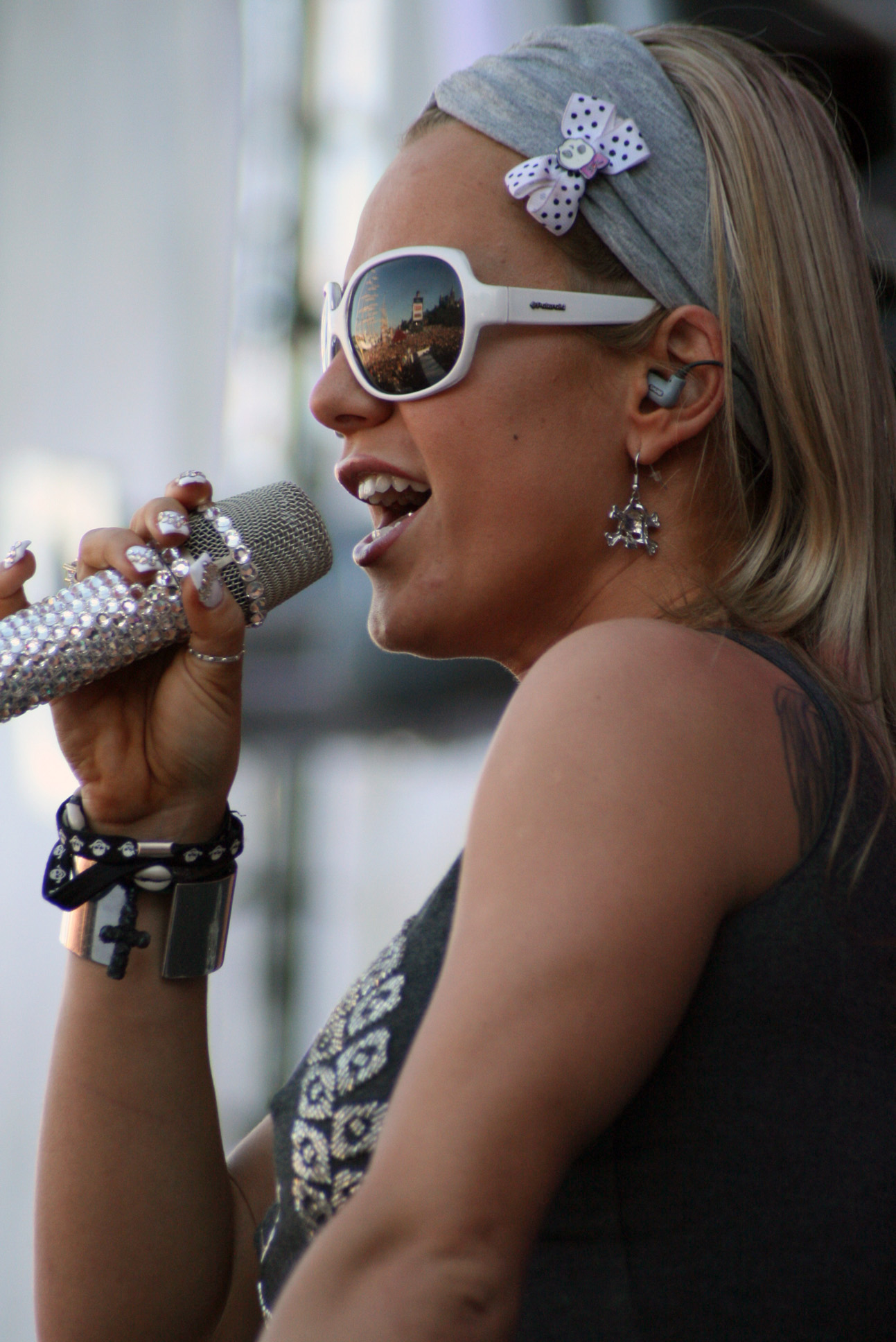 Dorota "Doda" Rabczewska, koncert "Hity na czasie” - The Tall Ships' Races, Szczecin 2007